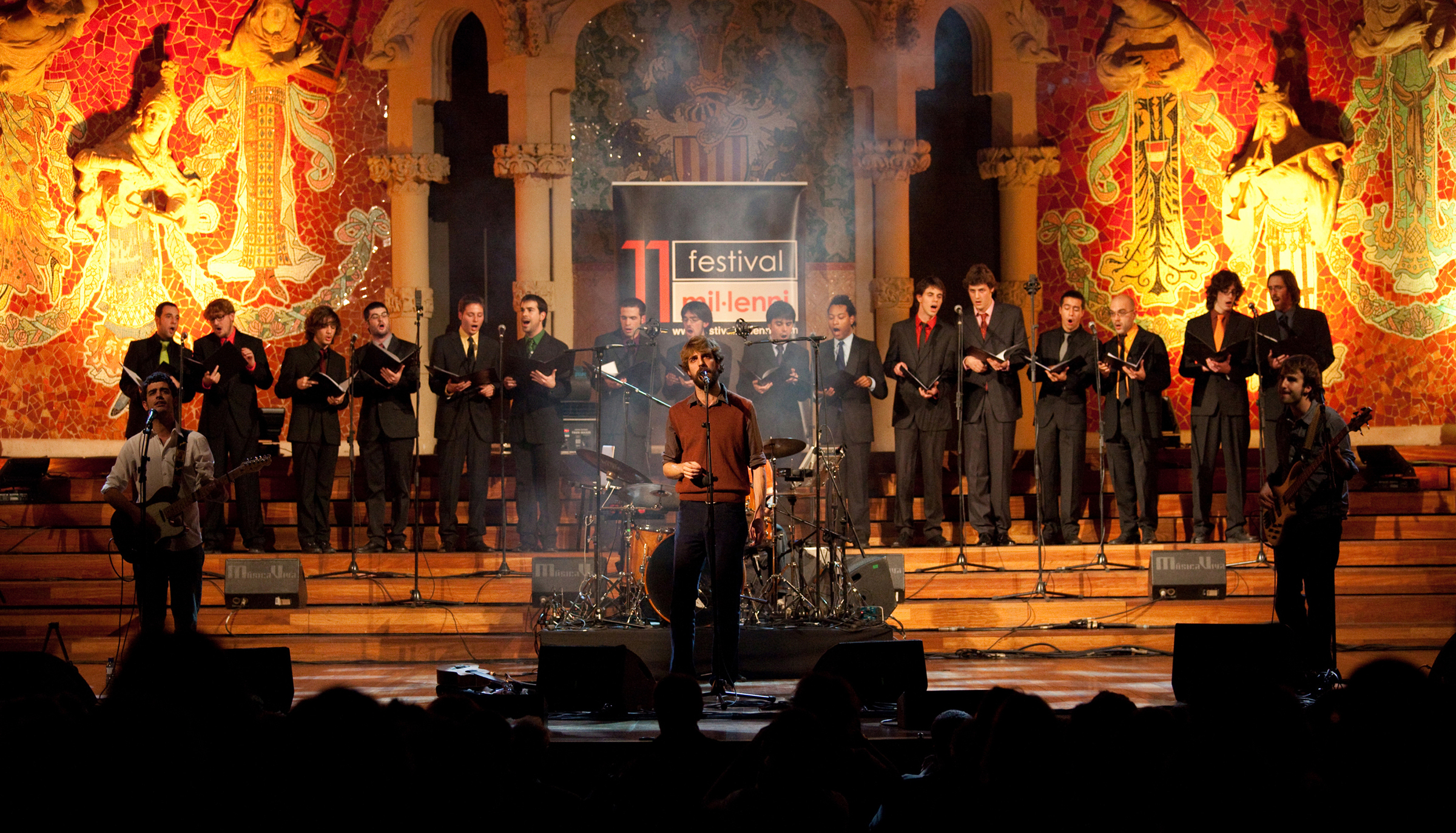 MANEL - Palau de la Música Catalana (15/01/2010)